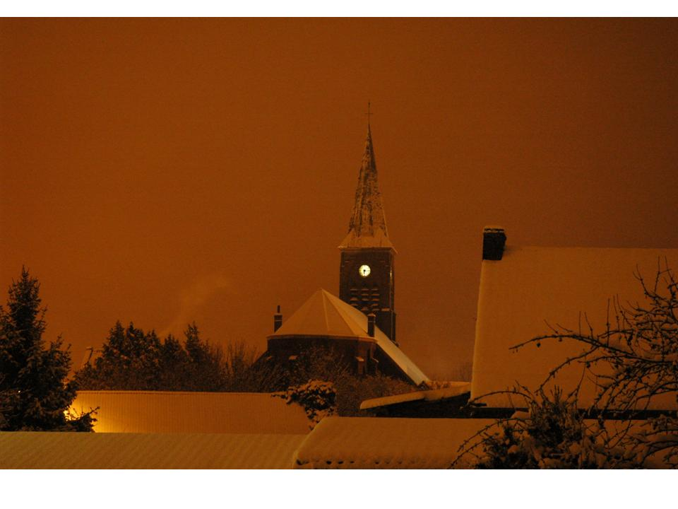 Hiver 2010, nuit du 19 decembre.